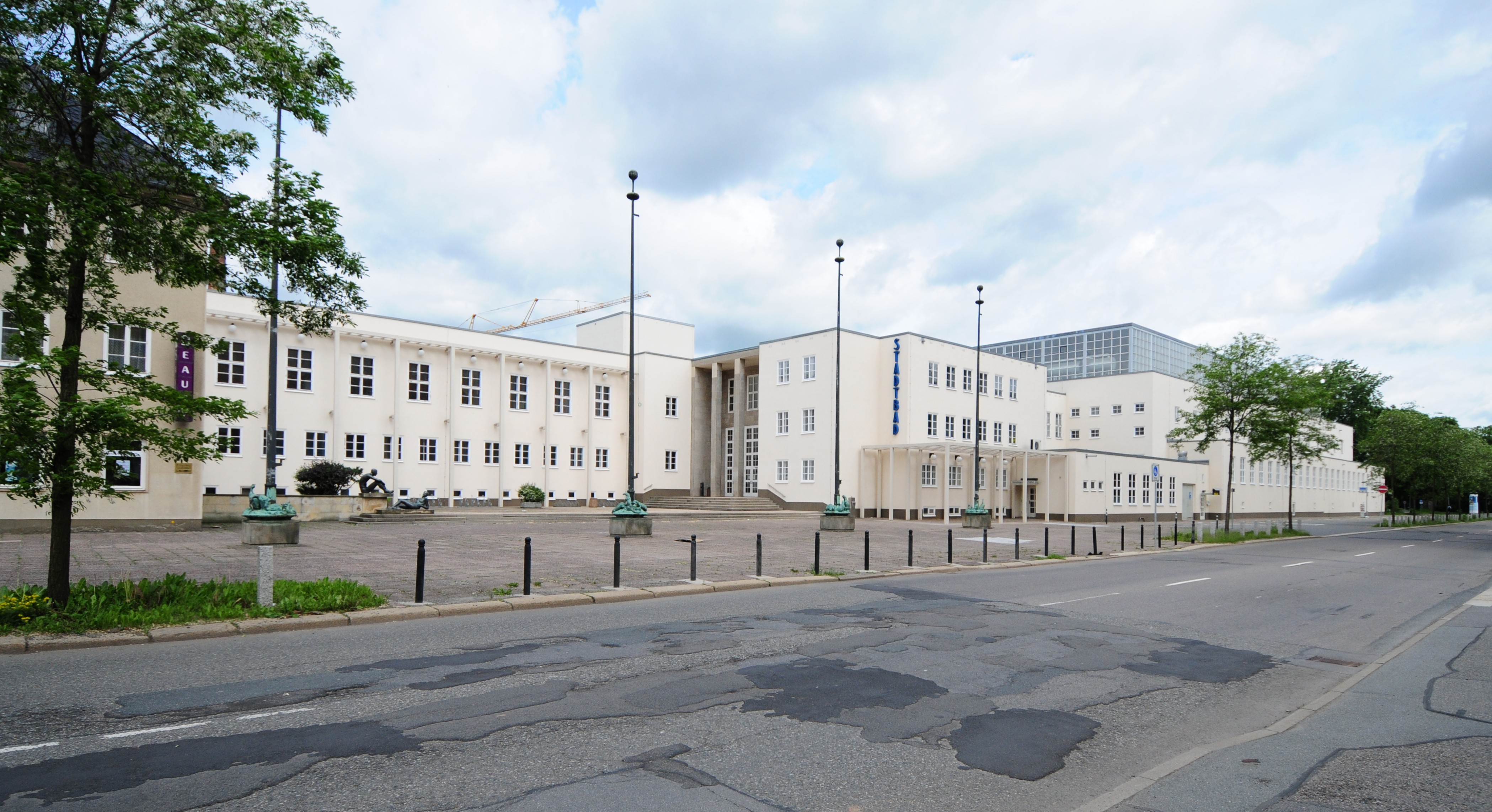 Stadtbad in Chemnitz, errichtet 1928-1935 nach Entwurf von Stadtbaurat Fred Otto (Sachsen, Deutschland)